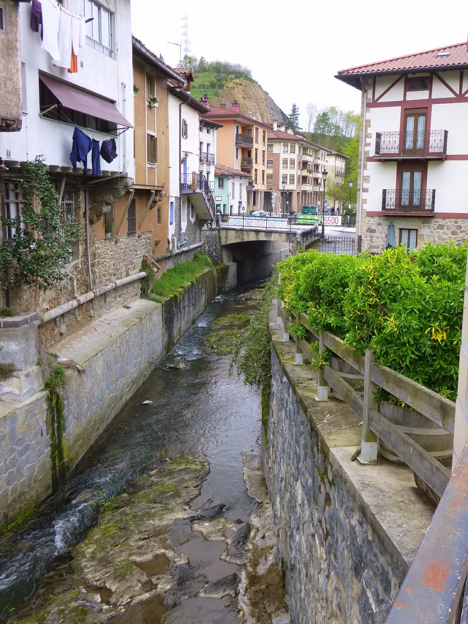 Antzuola (Gipuzkoa)